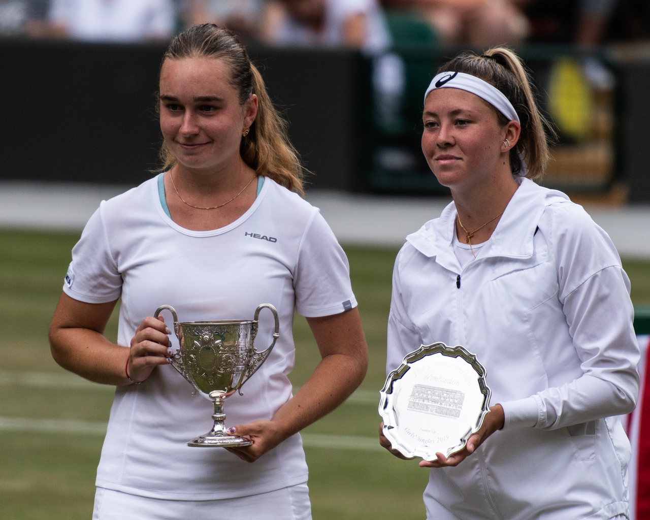 Daria Snigur